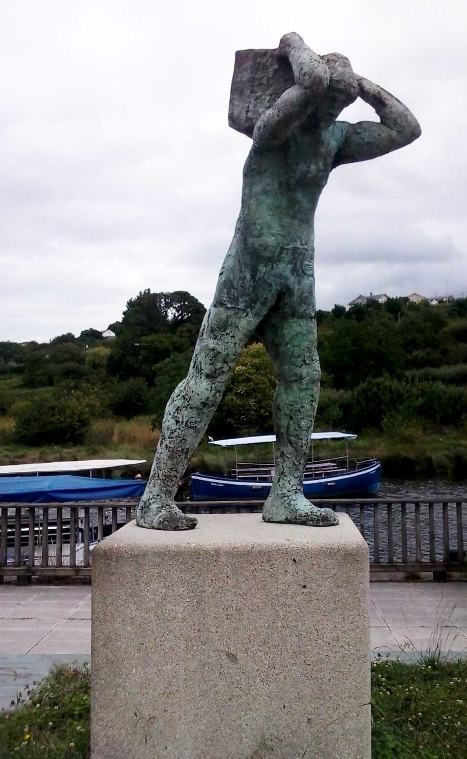 Porto de Betanzos, Areeiro